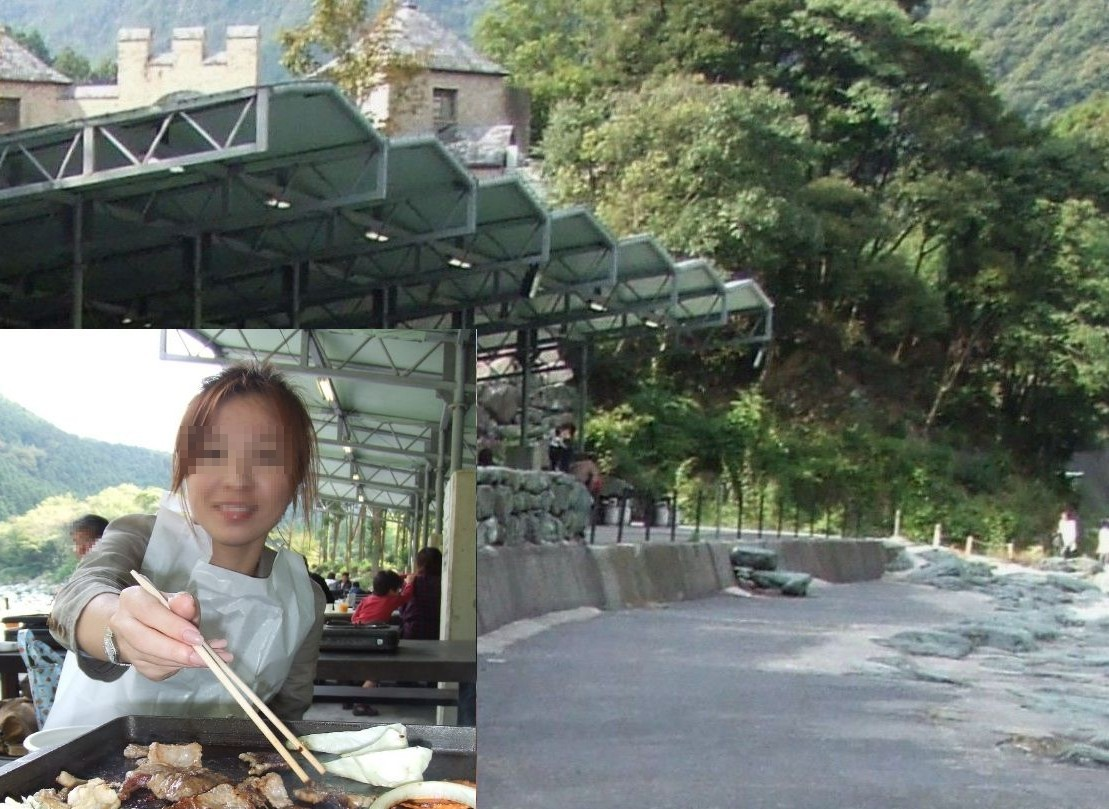 チロルの森 西条 バーベキューコーナー